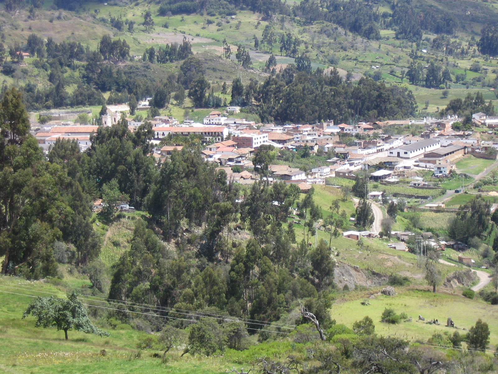 Panoramica de Chita